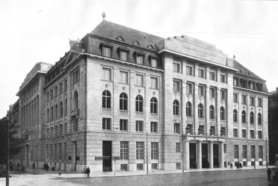 Wiener Bankverein, Schottengasse 6–8, um 1913